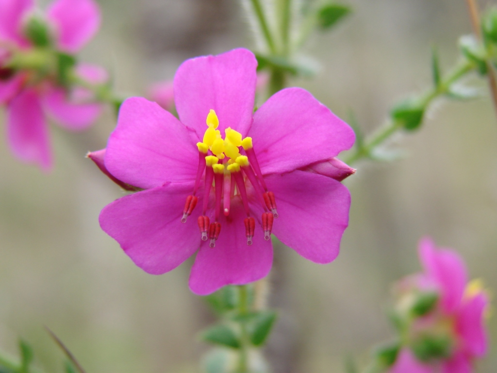 Microlicia euphorbioides - Melastomataceae - Alto Paraíso de Goiás - GO - Brasil